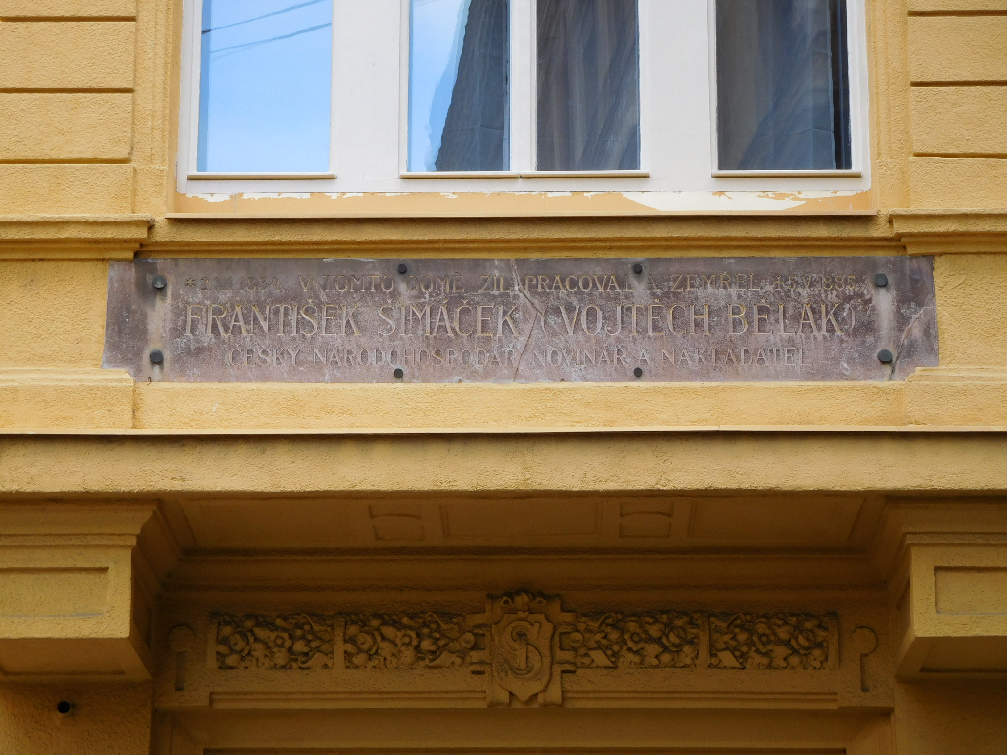 Praha - Nové Město, Jeruzalémská 9, pamětní deska Františka Šimáčka